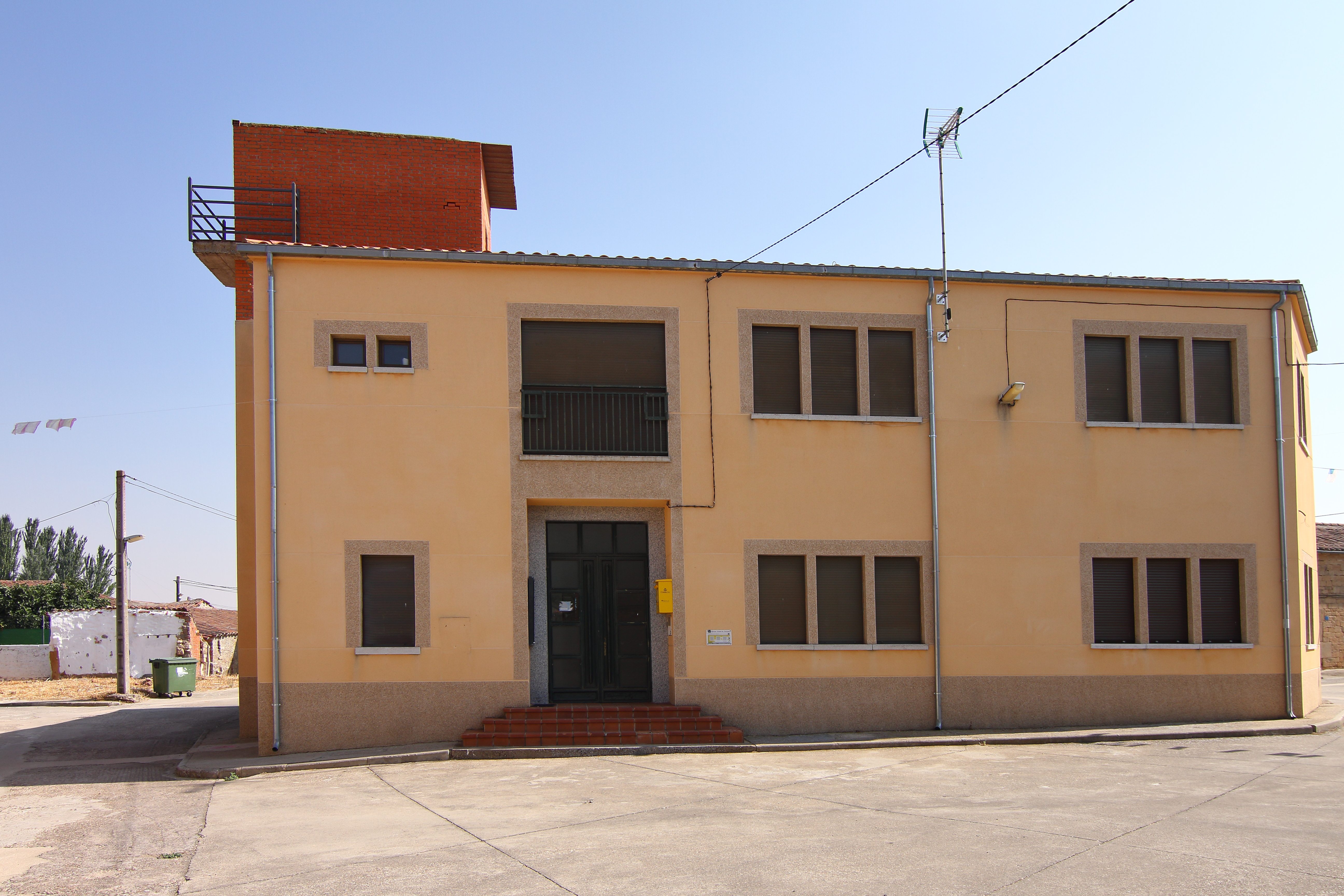 Ayuntamiento de Pedrosillo el Ralo